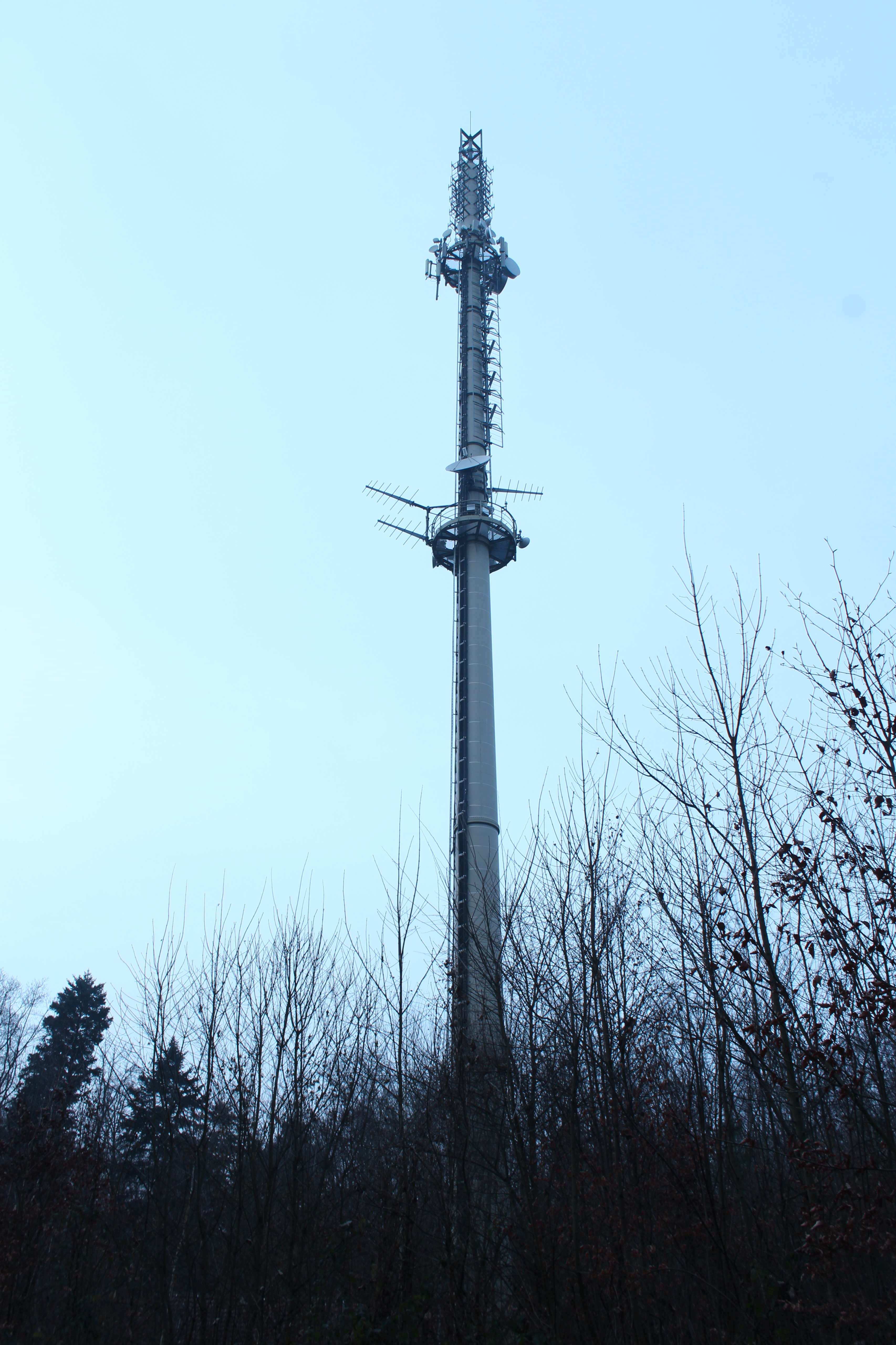 Wattkopfturm